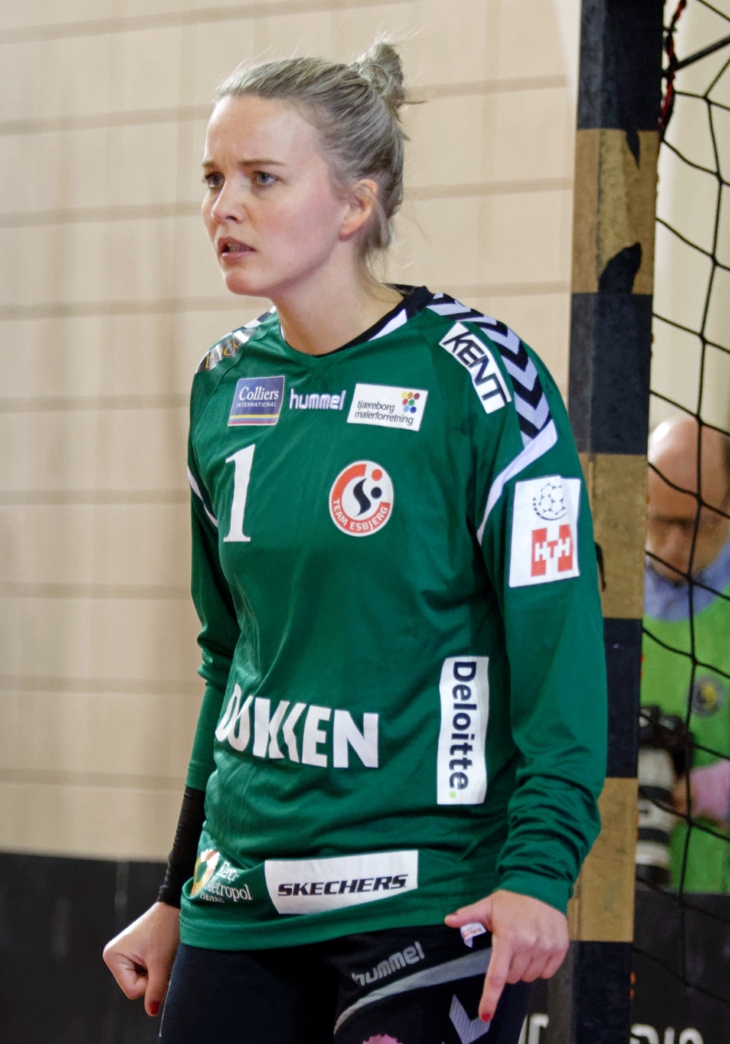 Lors de la rencontre du 3e tour de la Coupe EHF entre Paris 92 et les danoises de Team Esbjerg. A Issy les moulineaux, le 18 novembre 2018.